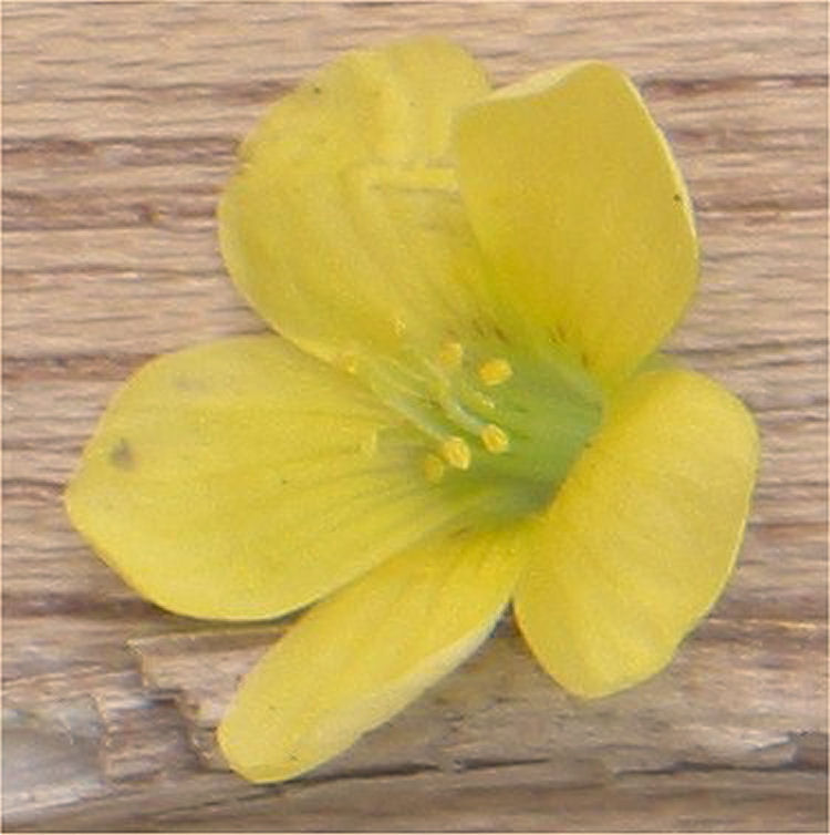 (nl: Stijve klaverzuring bloem) Oxalis fontana